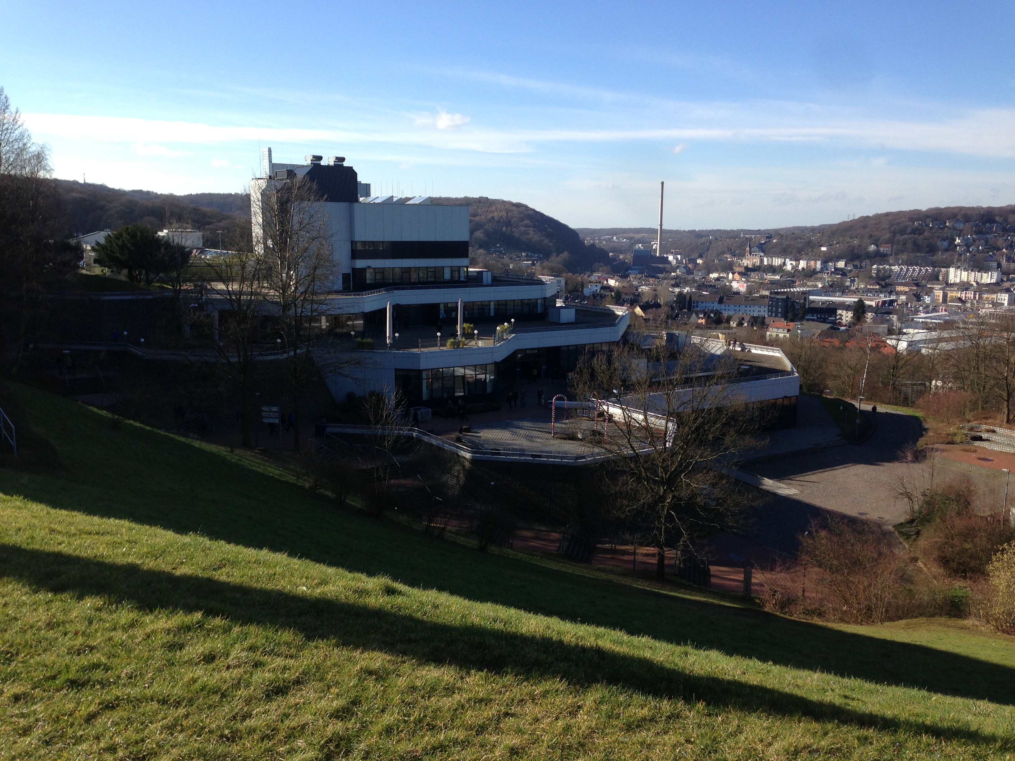 Mensatrakt der Bergischen Universität